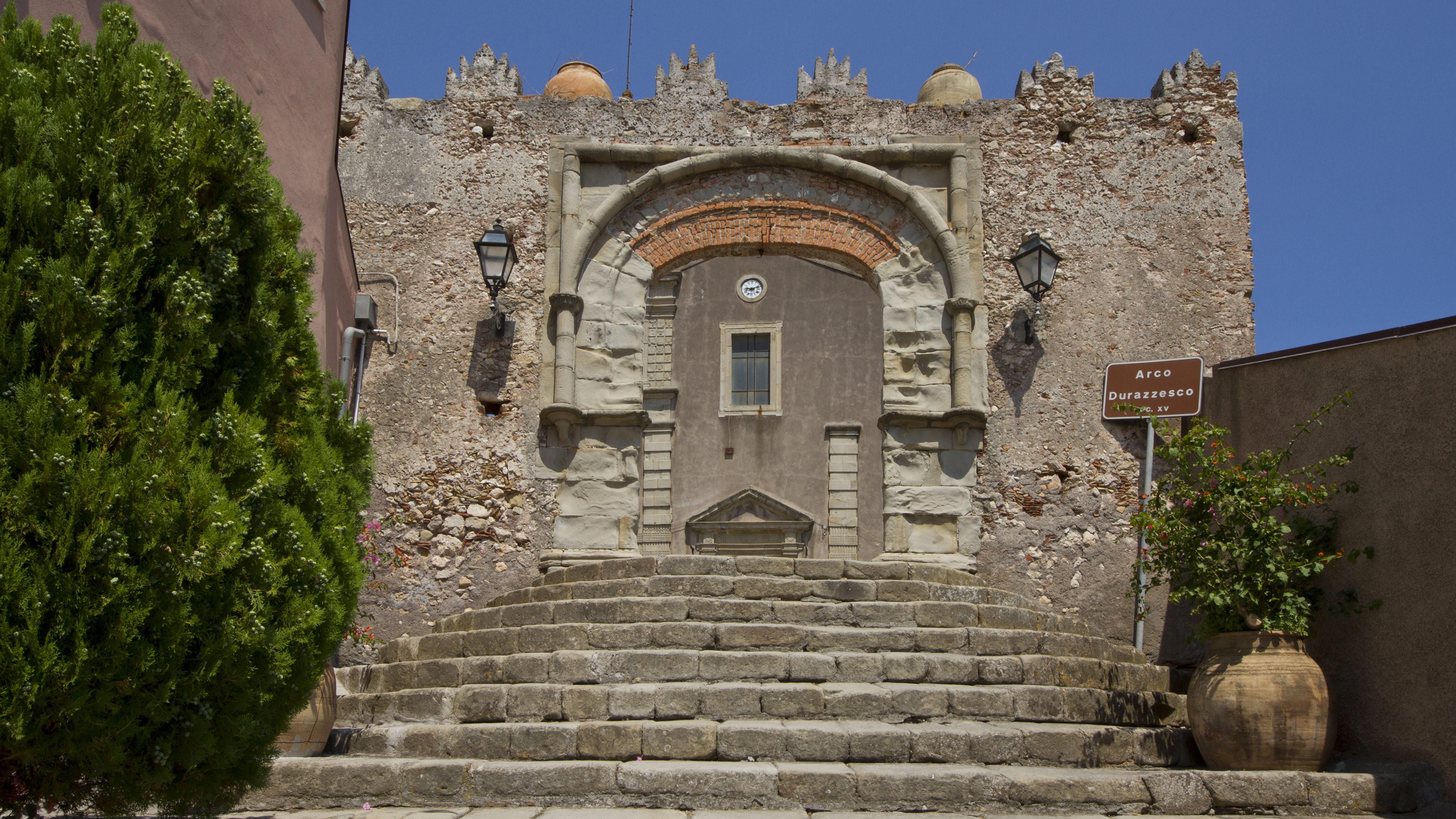 Arco Durazzesco, Forza D'agrò Messina, Sicily, Italy